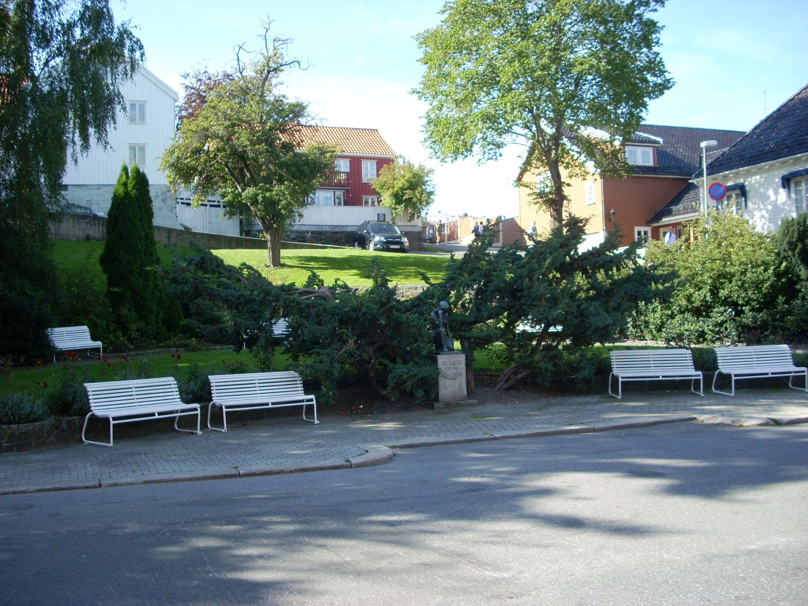 Anton Christian Houens plass bak Trefoldighetskirken i Arendal, minnested for de falne i andre verdenskrig.